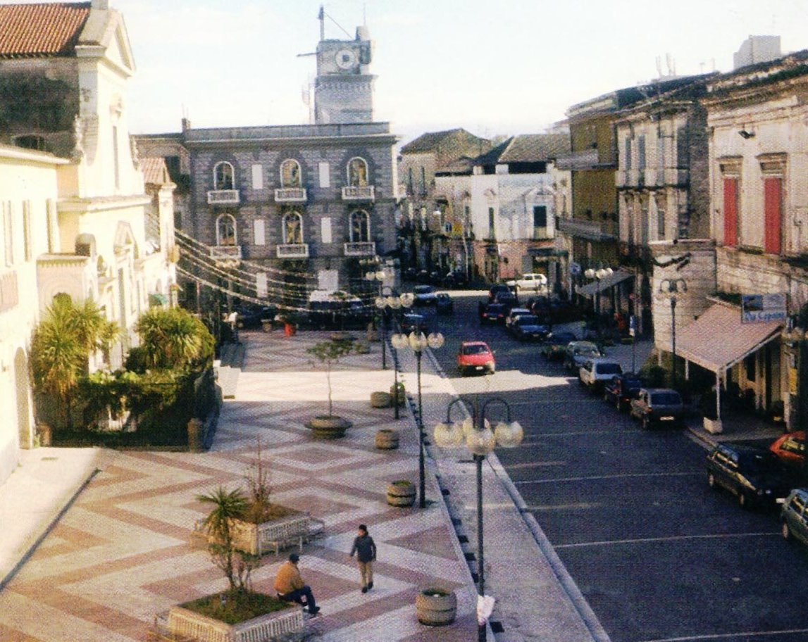 Strada di Cardito